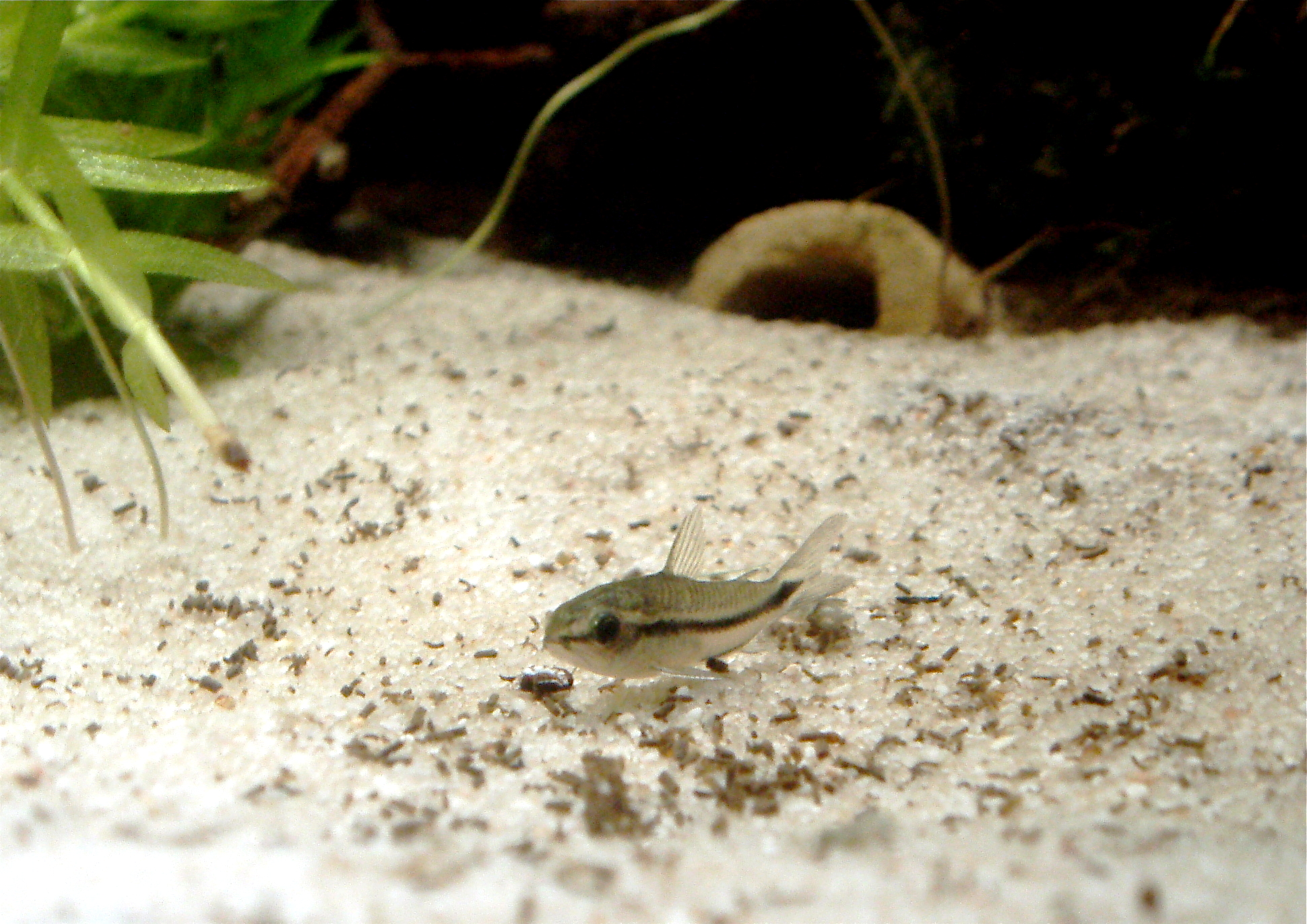 Zwergpanzerwels (Corydoras pygmaeus)